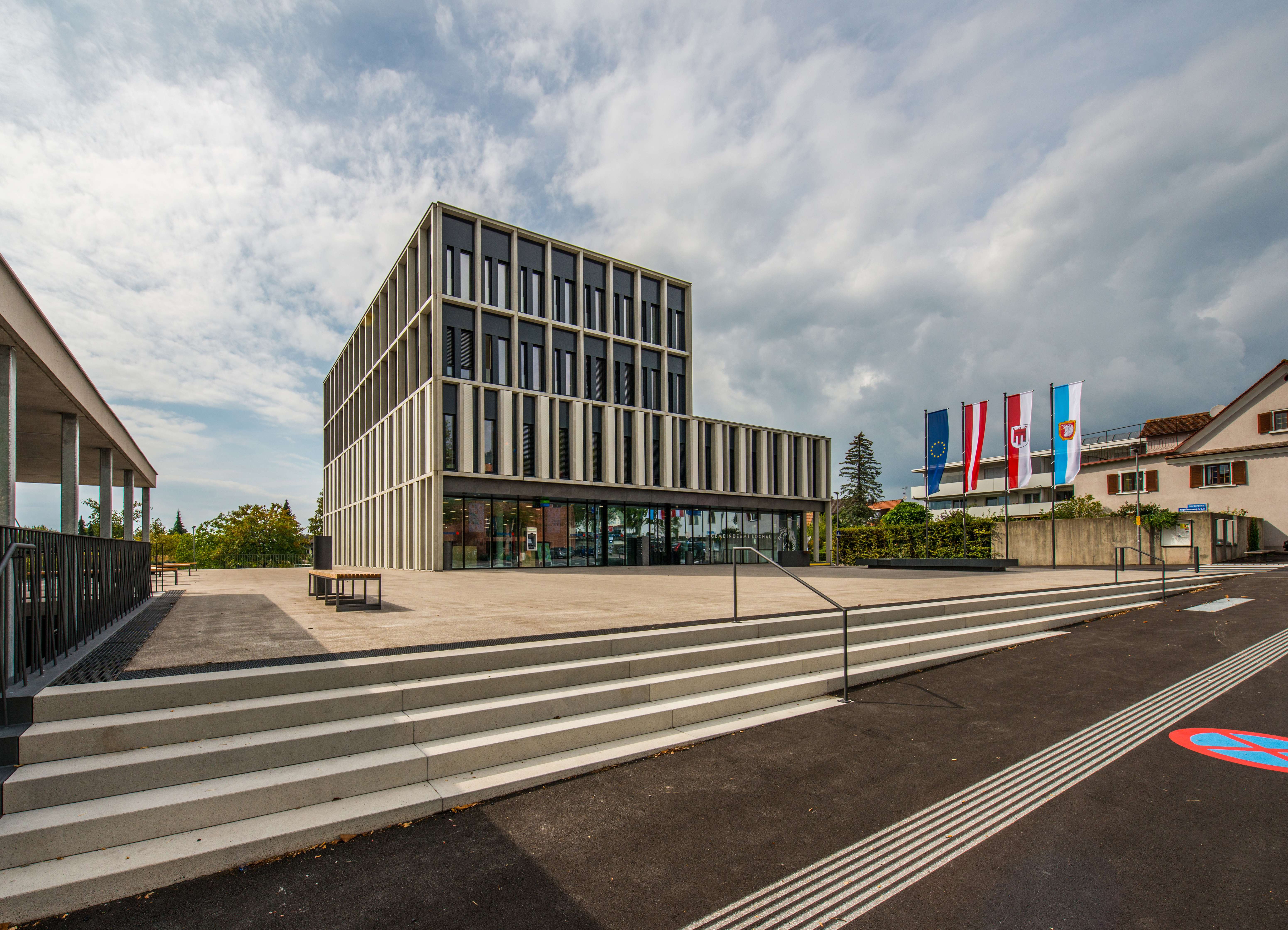 Gemeindeamt Lochau in Vorarlberg.